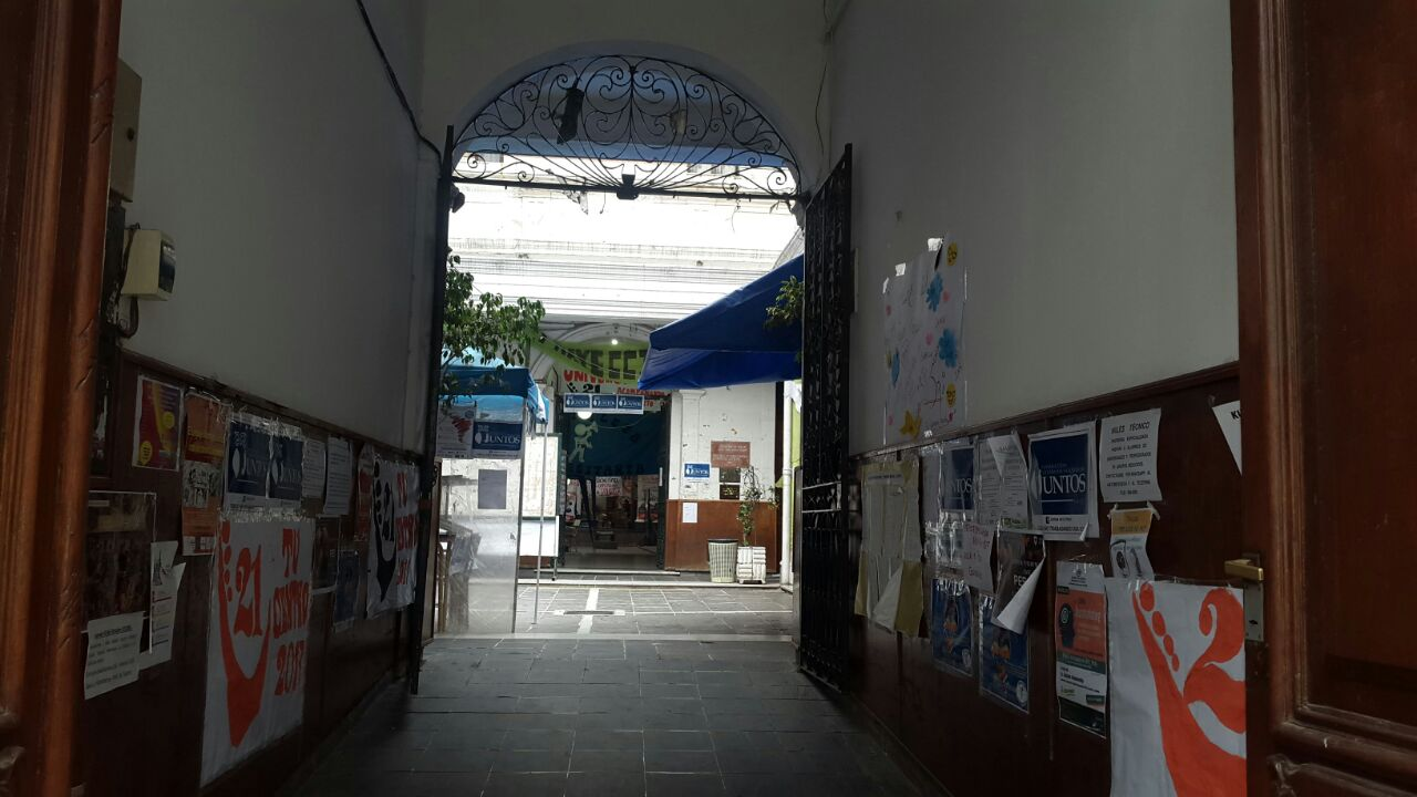 Entrada Facultad de Humanidades y Cs Ss UNJU